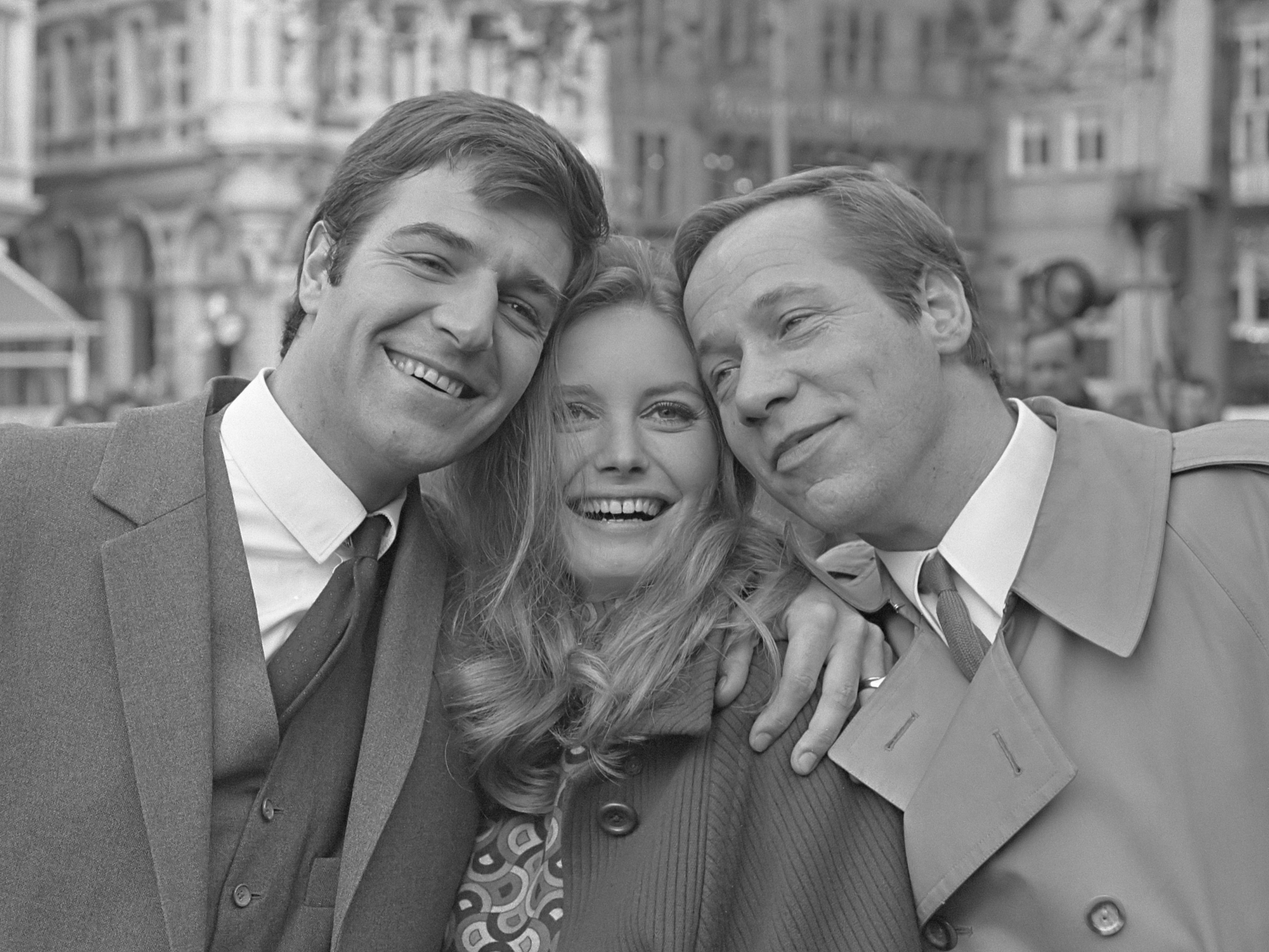 Opname speelfilm "Love in Amsterdam" op Rembrandtplein; Guido de Moor, Catherine Schell en Piet Römer (in 1970 uitgebracht als "Amsterdam Affair") 15 november 1967